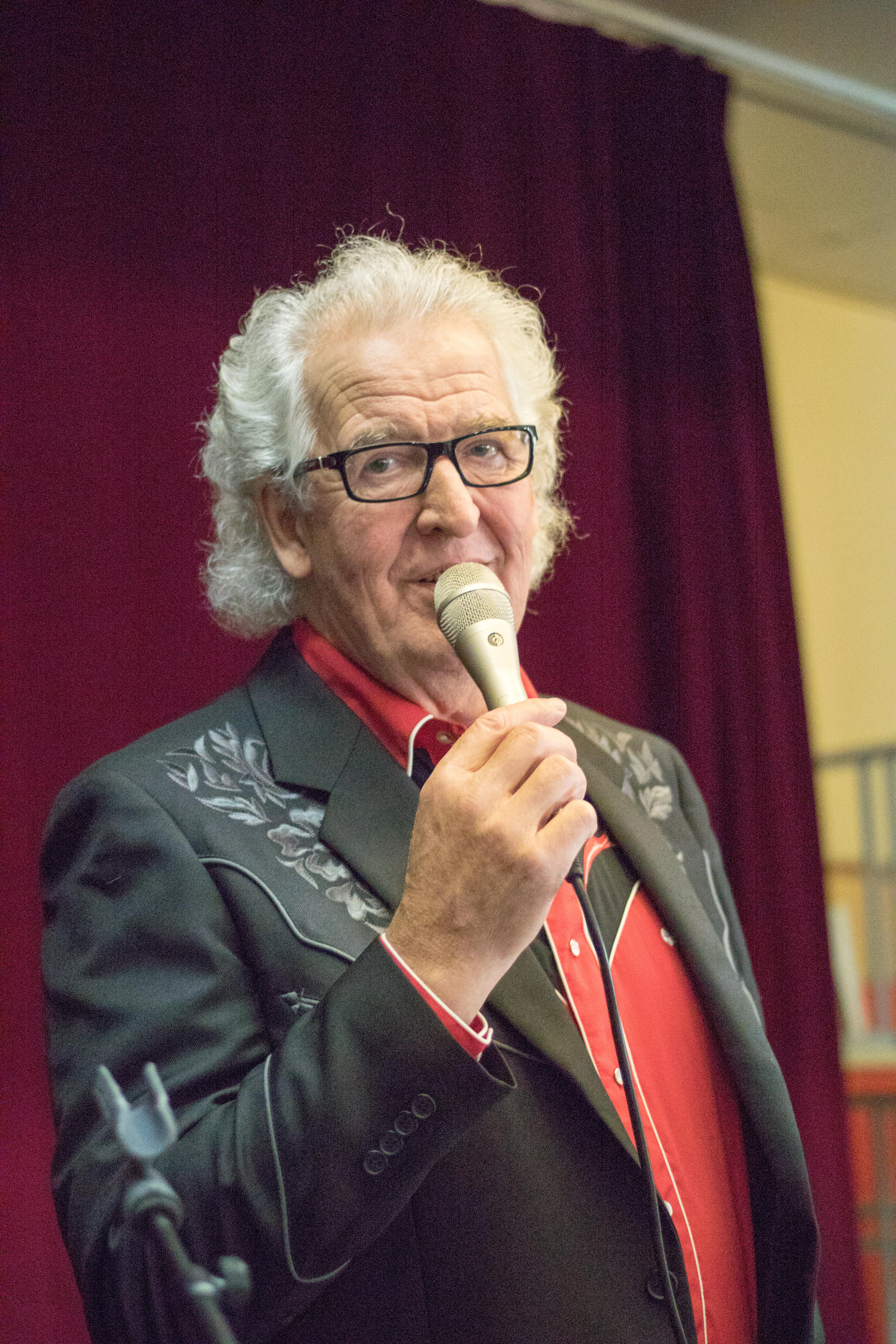 Jussi Roponen